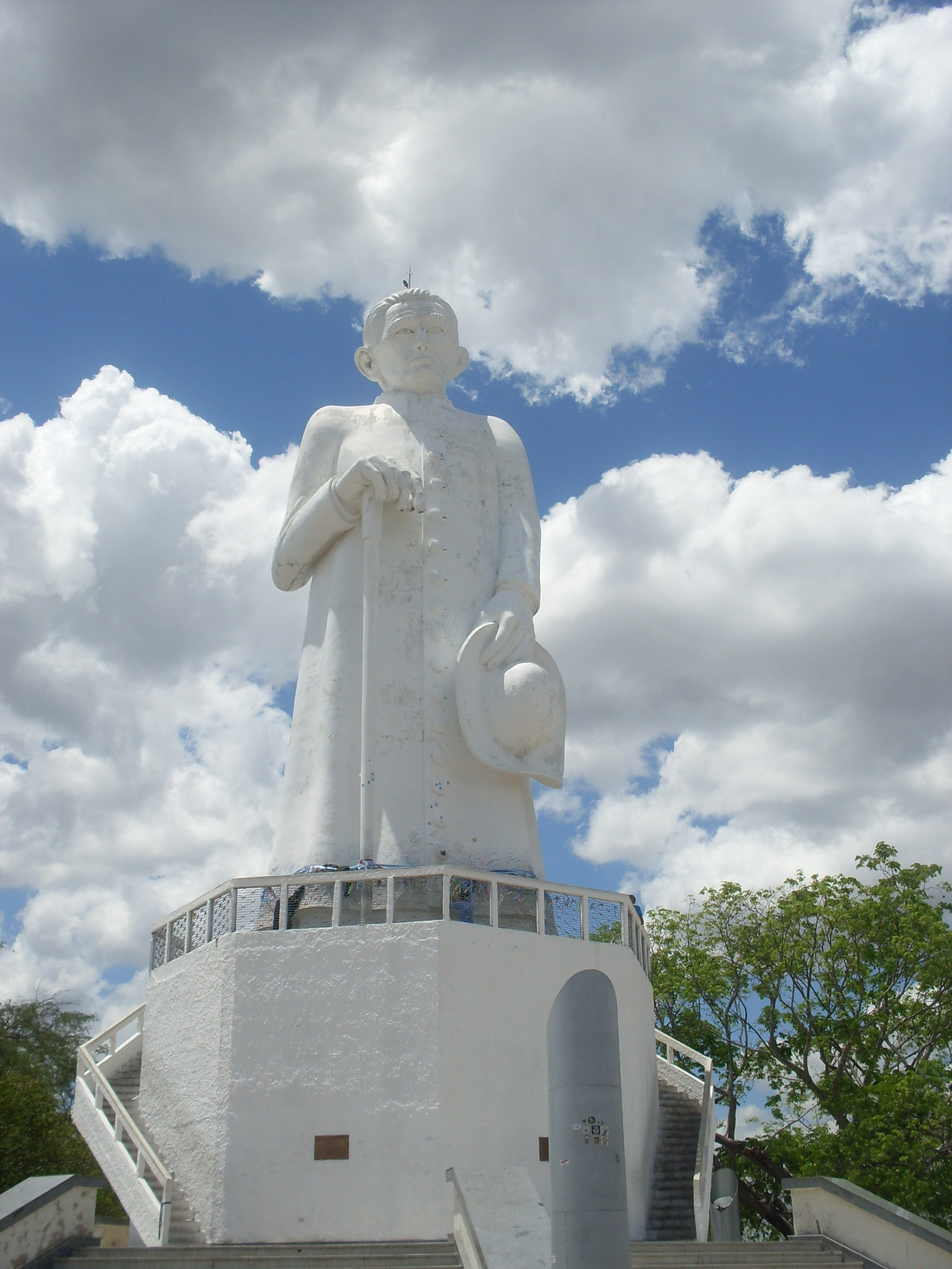 Estátua de Padre Cícero, Juazeiro do Norte, Ceará, Brasil.